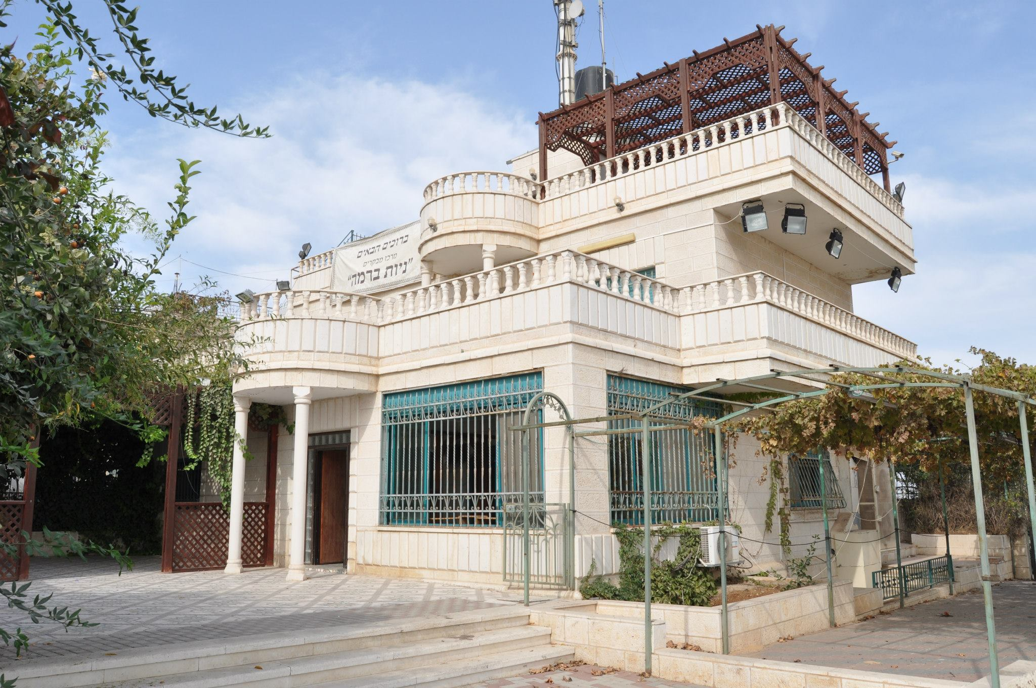 מרכז מבקרים ראשית ירושלים בנבי סמואל